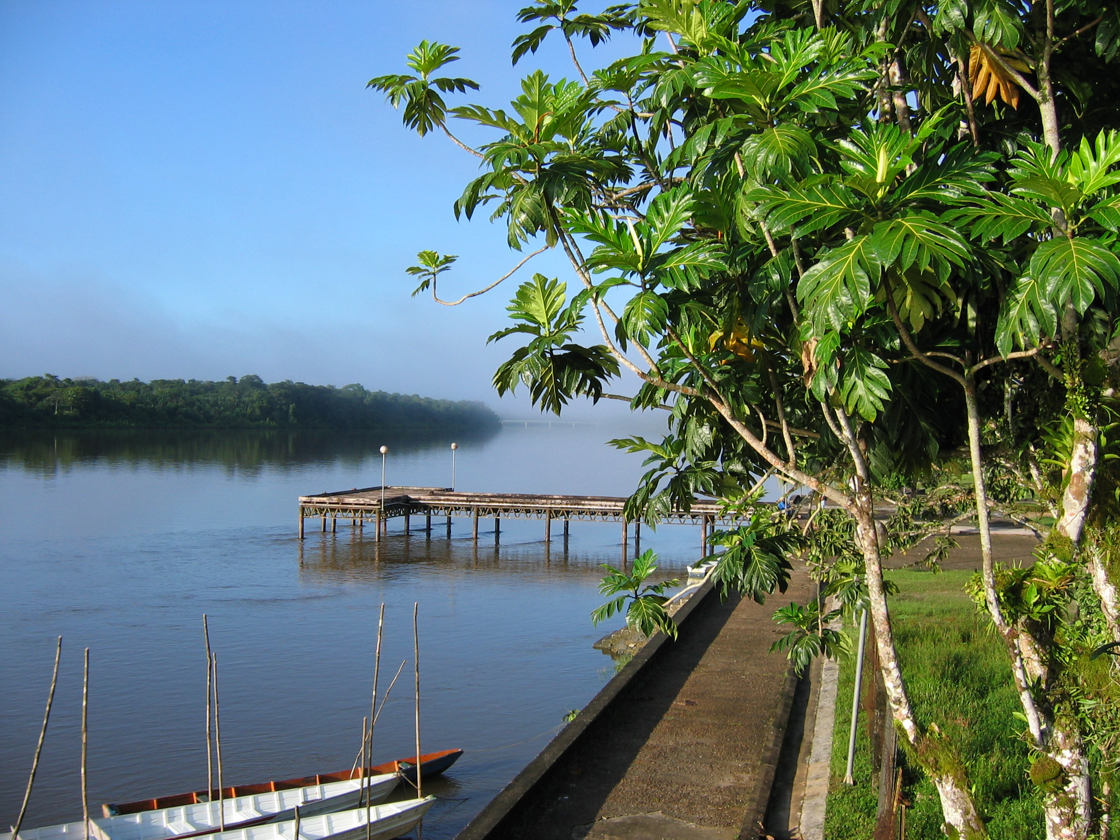 Vue de l'approuague depuis Régina